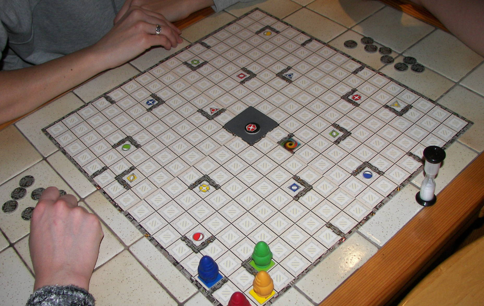 Rasender Roboter board